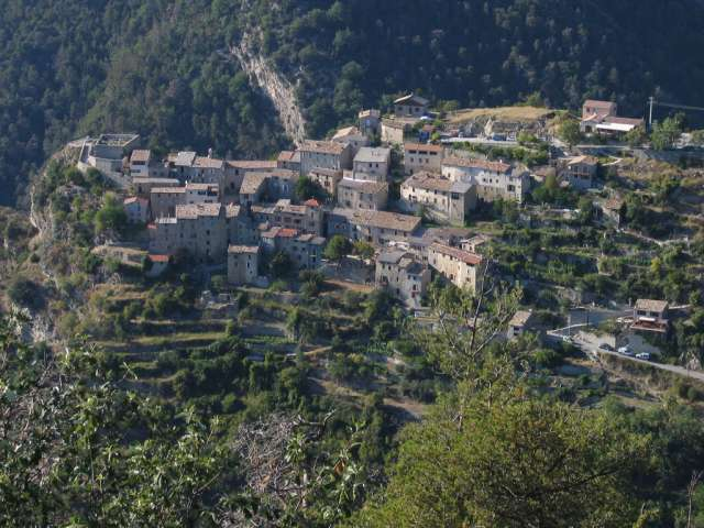 Le village de THIERY - FRANCE (06)